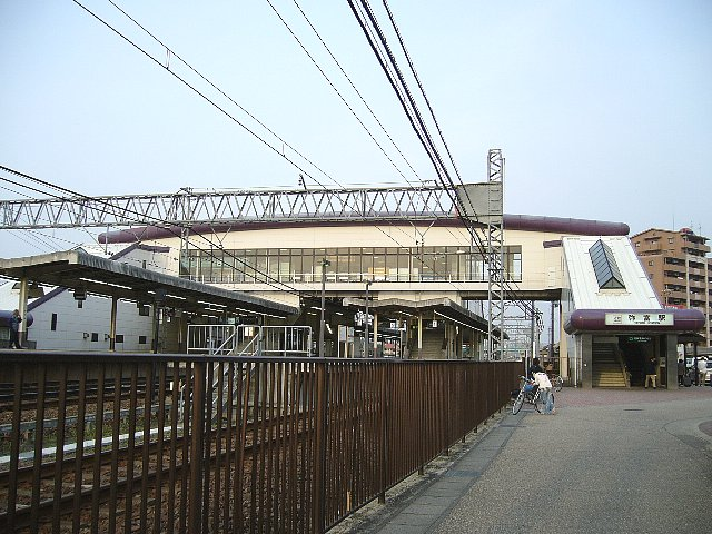 近鉄弥富駅